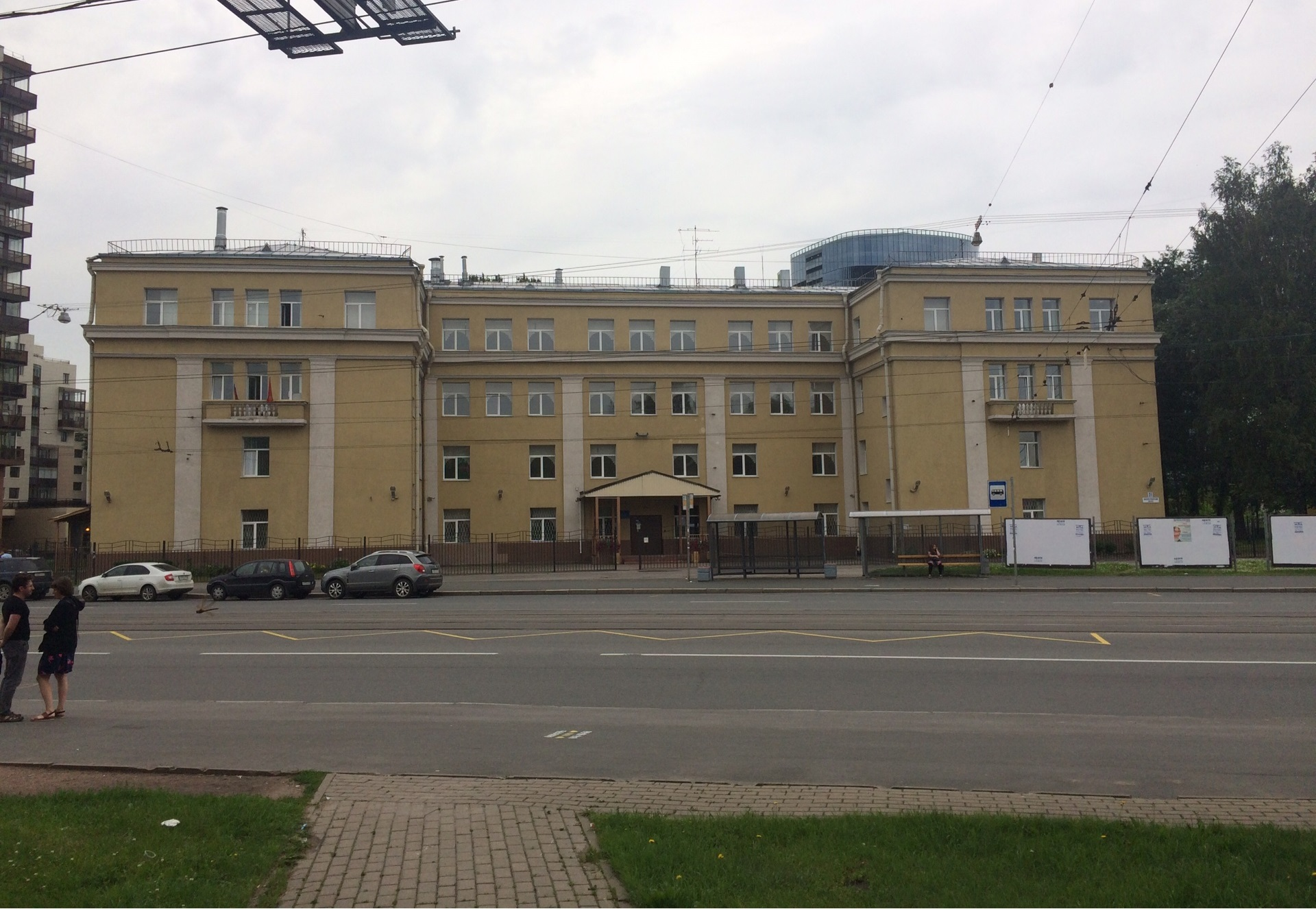 Здание, в котором находилась в 1950-х годах 145 школа на Новочеркасском пр., 31